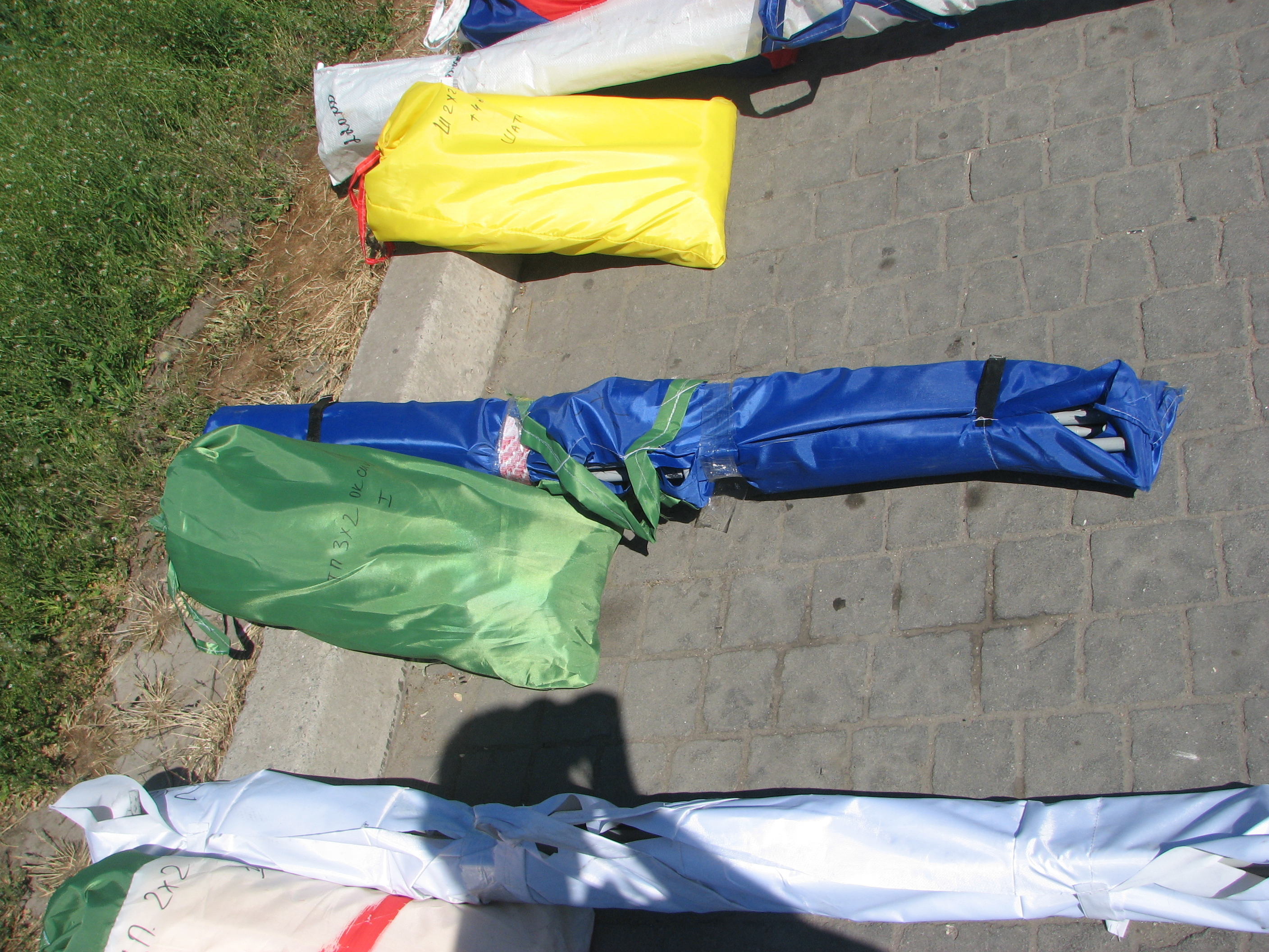 Торгова палатка у розібраному вигляді